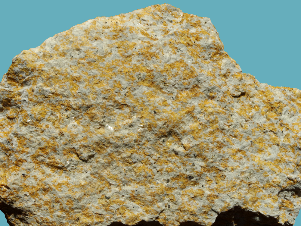 Vzorek navětralého, pestře skvrnitého trachytu pochází z lomu u Špičáku u Teplé. Skutečná šířka záběru je 12 cm.